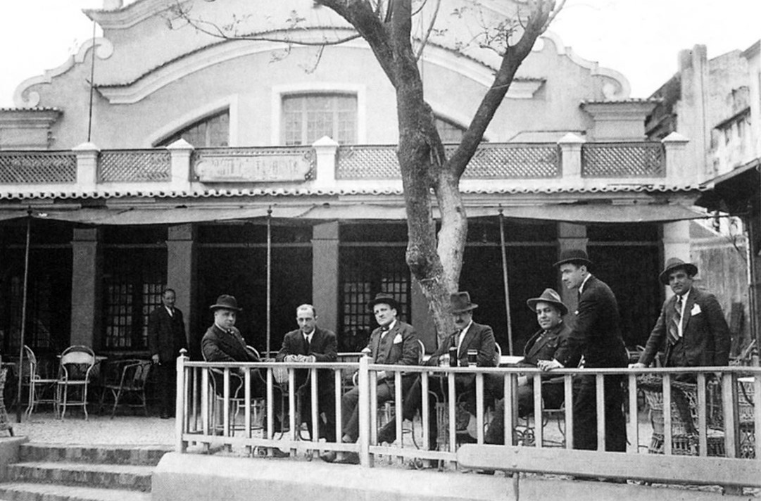 Restaurante no Parque Mayer inicio sec. XX